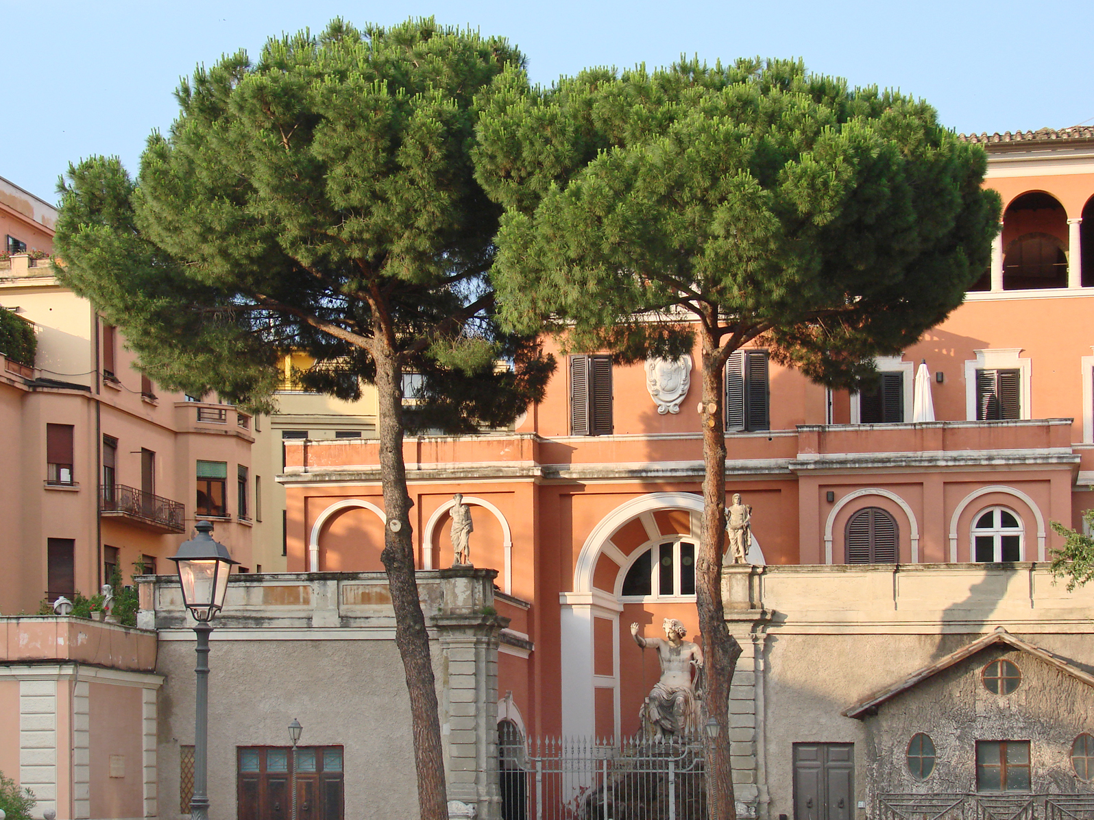 Le jardin et les bâtiments autour du palais Barberini (détail) Le palais a été conçu en 1625 par Carlo Maderno, à la demande du Cardinal Maffeo Barberini, devenu Pape en 1623 sous le nom d'Urbain VIII. La forme du bâtiment est celle d'une vaste villa avec deux ailes en H qui s'avancent dans des jardins. Ces jardins sont entourés de bâtiments récents comme on le voit sur la photo. Site officiel de la Galerie du palais Barberini